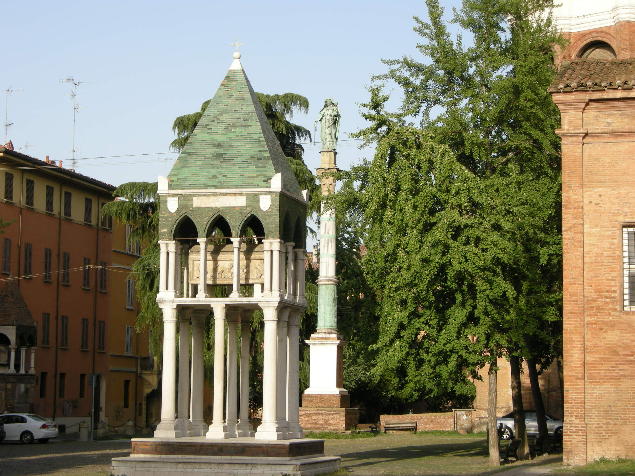 San domenico, bologna, arca